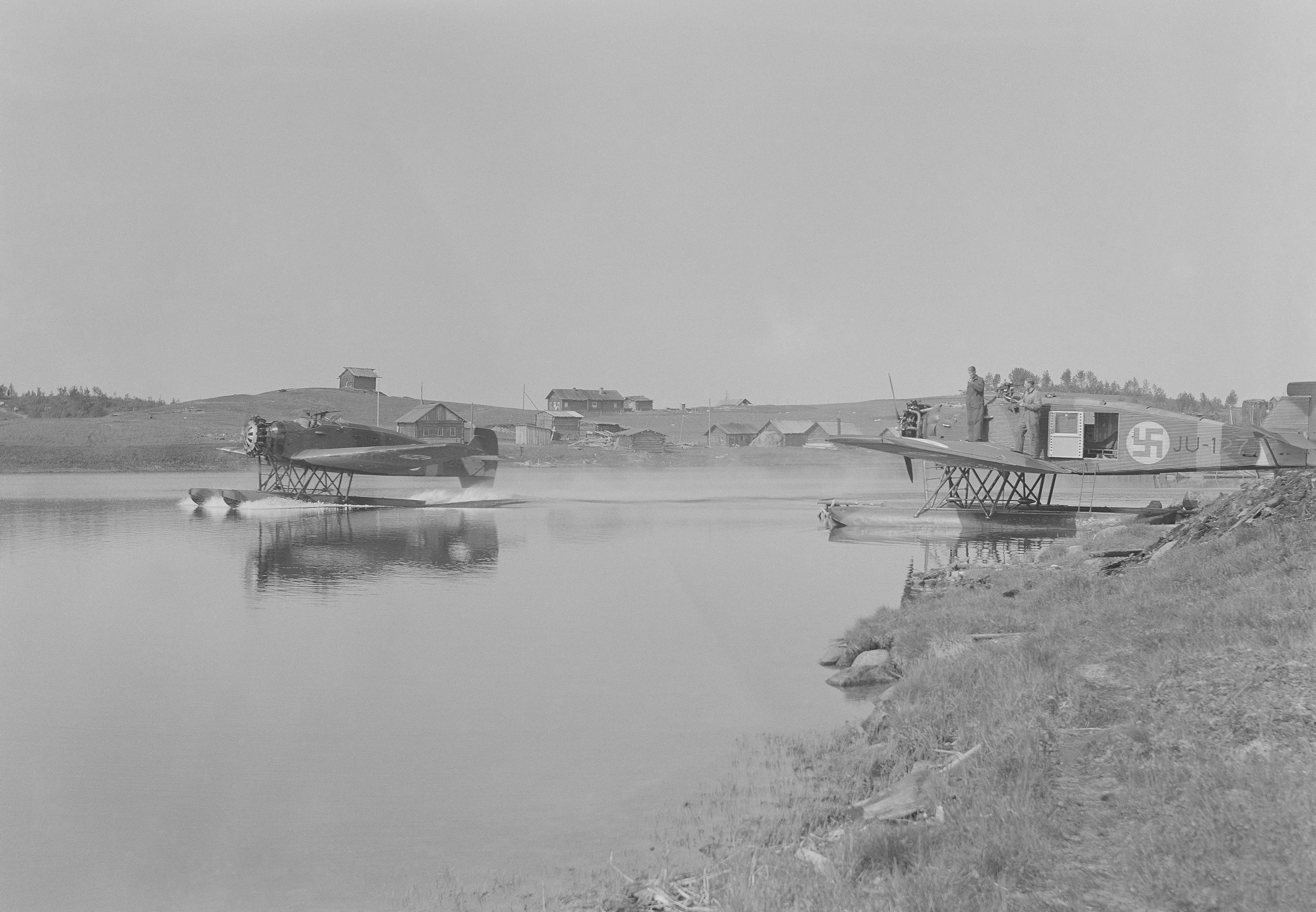 Potilaita kuljetetaan lentokoneilla, kuvattu Kananaisten kylästä. (Kuvassa on Junkers K 43fa -kuljetuslentokoneita). Kuvauspaikka: Kiestinki, Kananainen